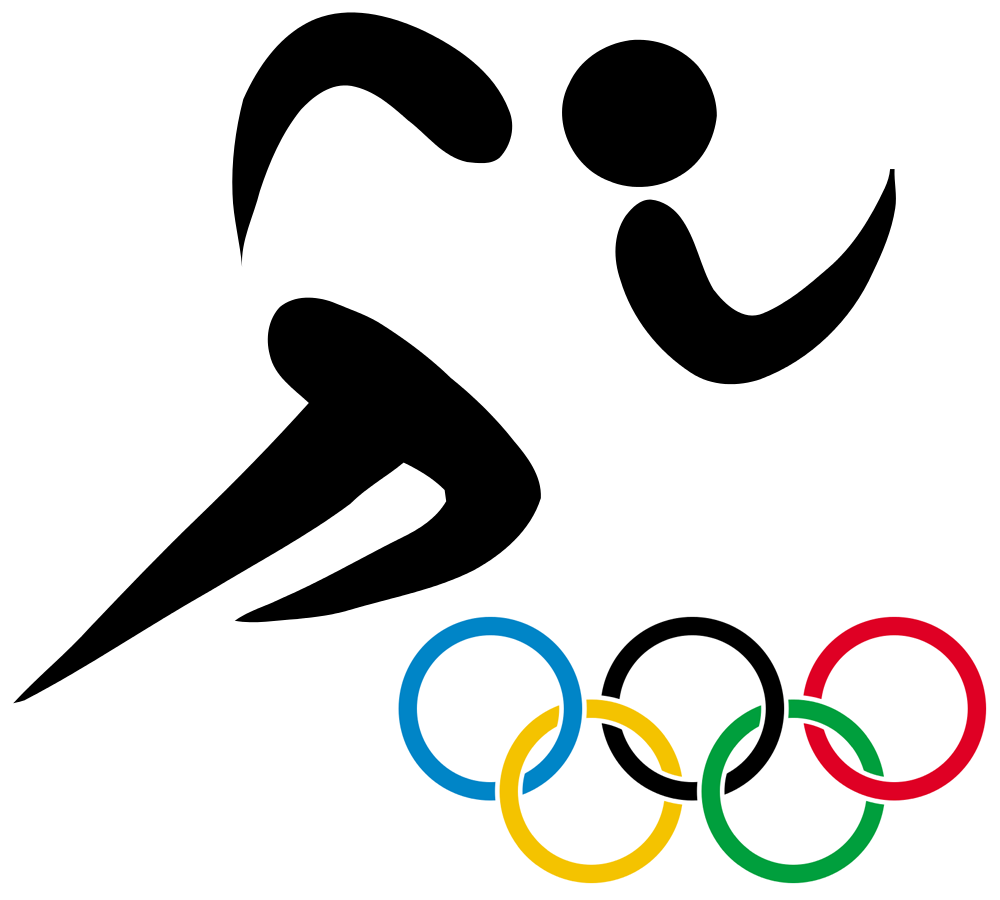 Olympic Athletics